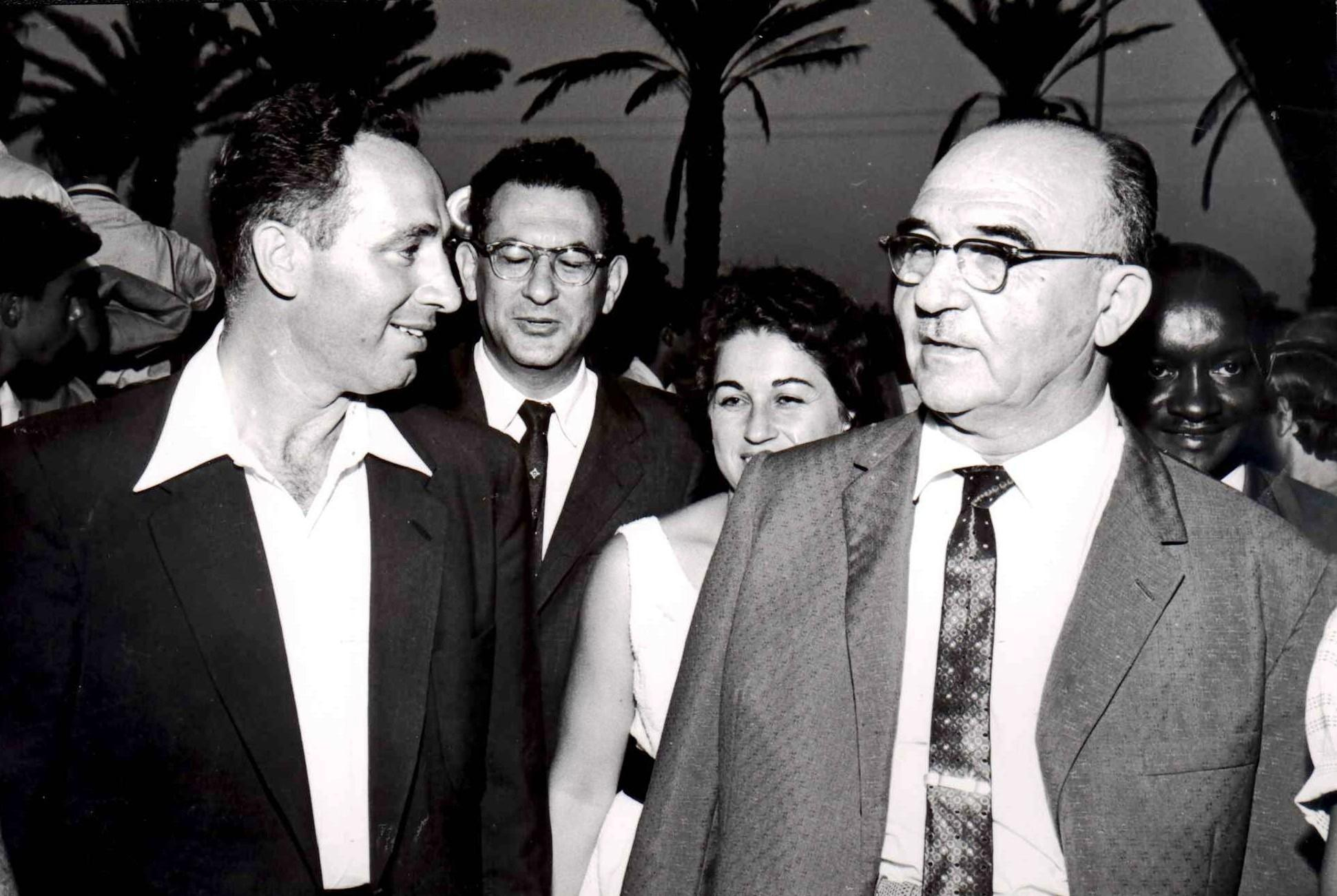 פגישת ראש עיריית רחובות ורעיות ניצה עם ראש הממשלה לוי אשכול ועם שמעון פרס